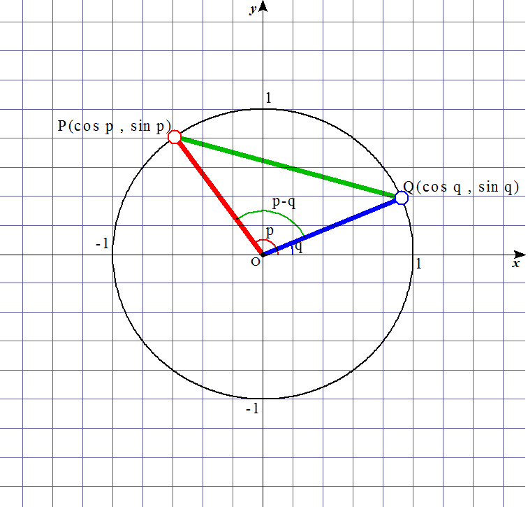 加法定理の説明